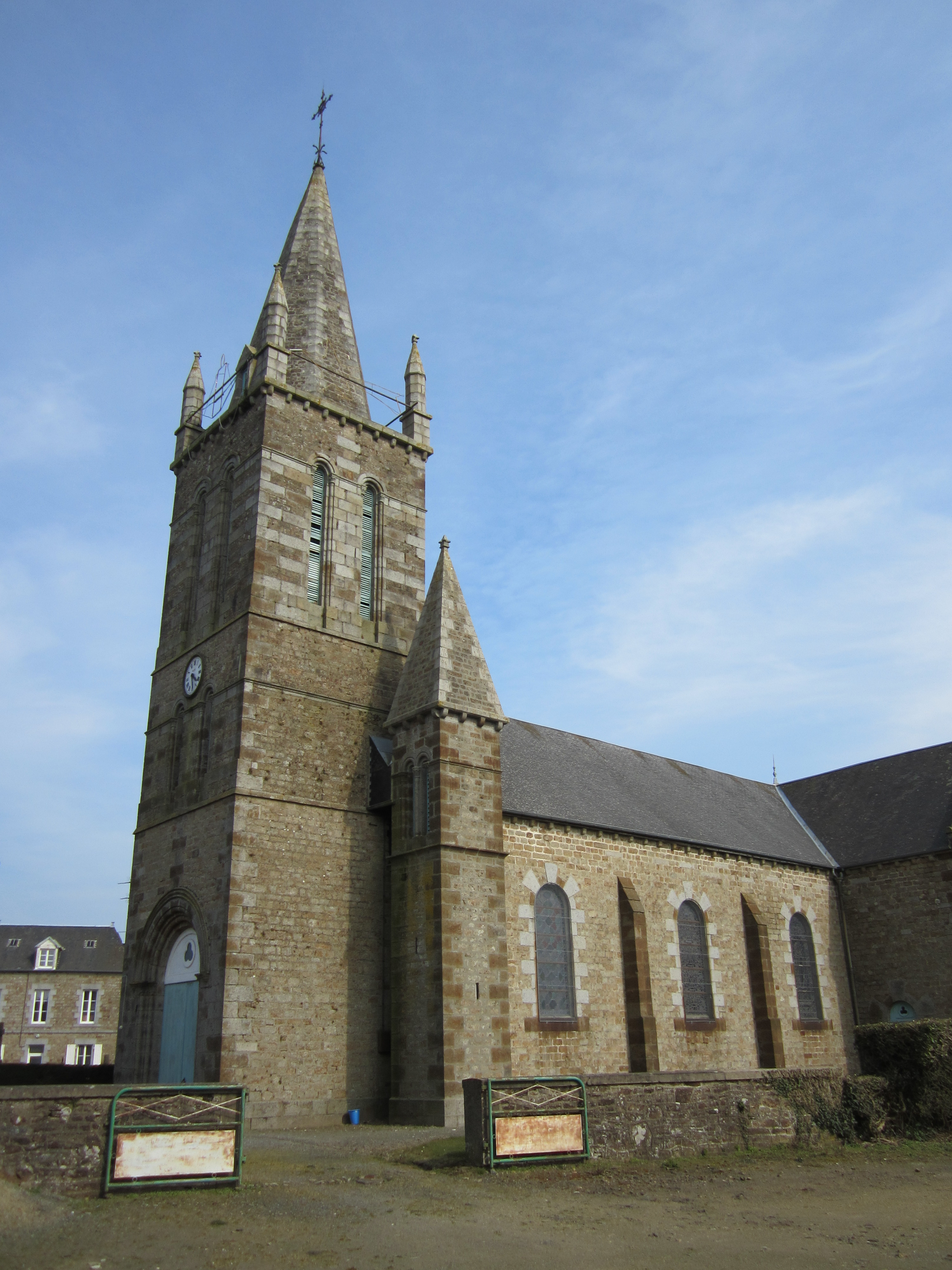 église Saint-Léonard (XIXème) de Reffuveille, MAnche